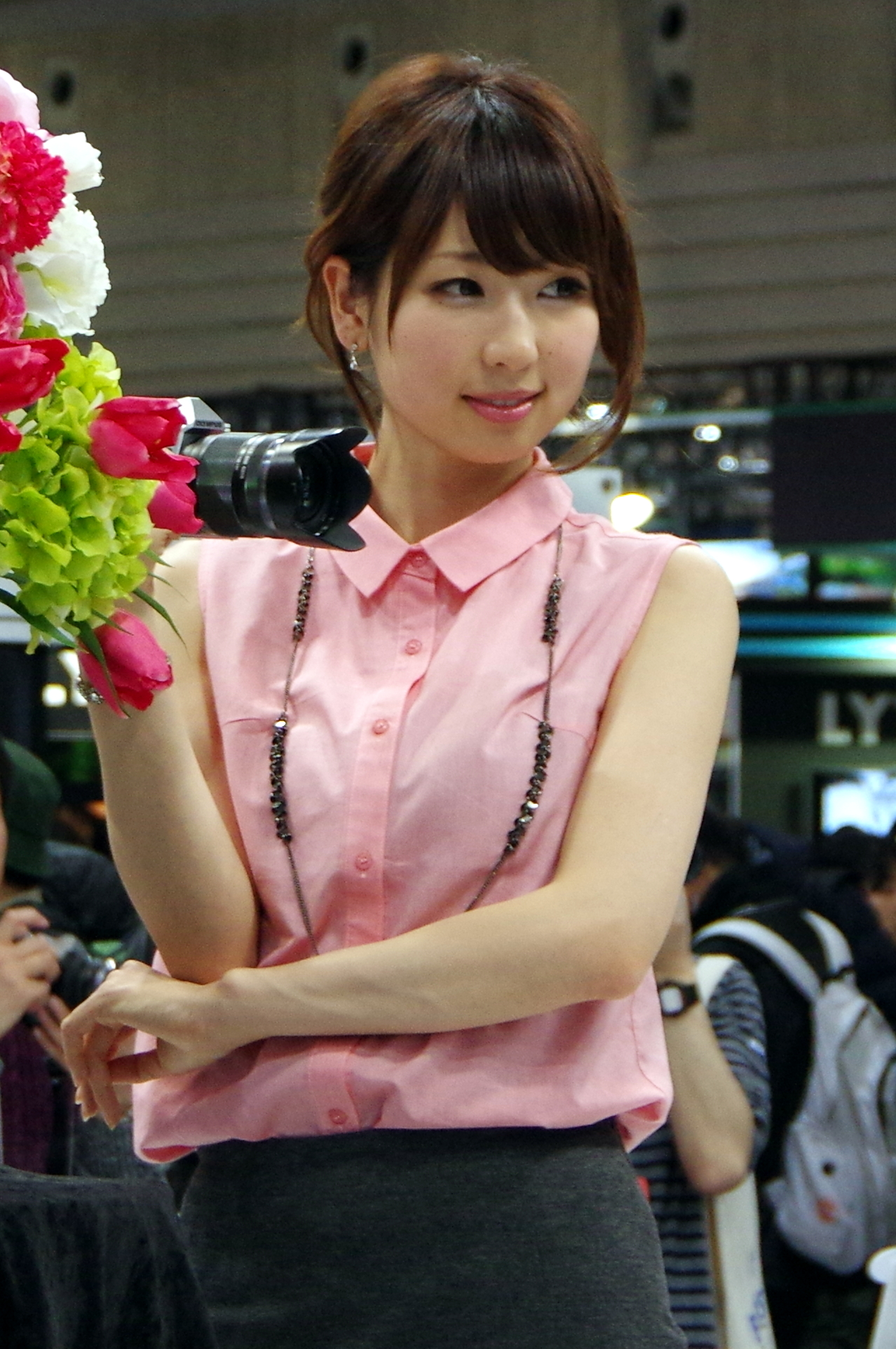 Kiyose Machi at CP+2015